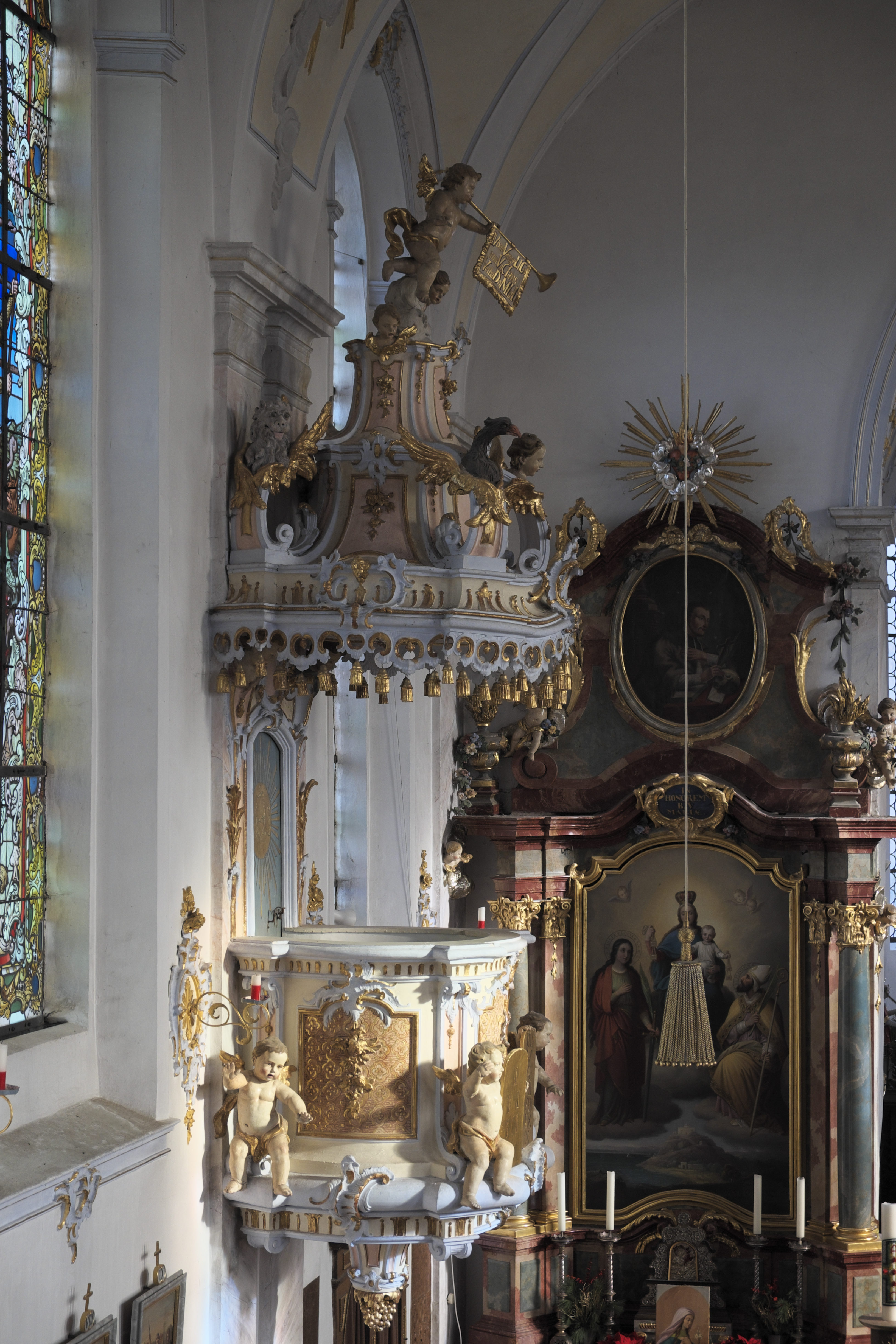 Katholische Pfarrkirche St. Laurentius in Pähl im Landkreis Weilheim-Schongau (Bayern/Deutschland), Kanzel